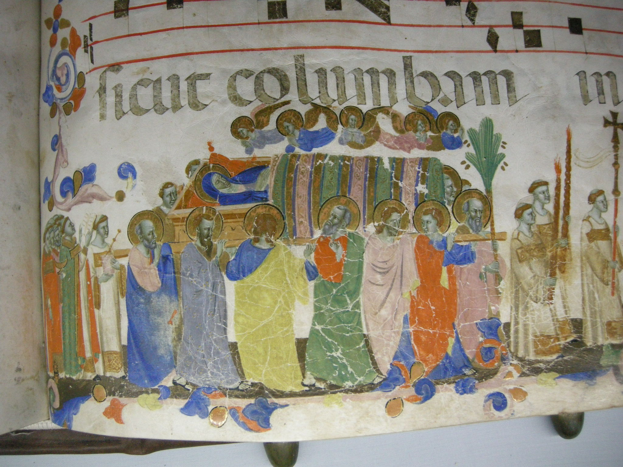 Primo miniatore pacinesco, e maestro delle effigi domenicane, Funerale della Vergine, antifonario, 1325-1350